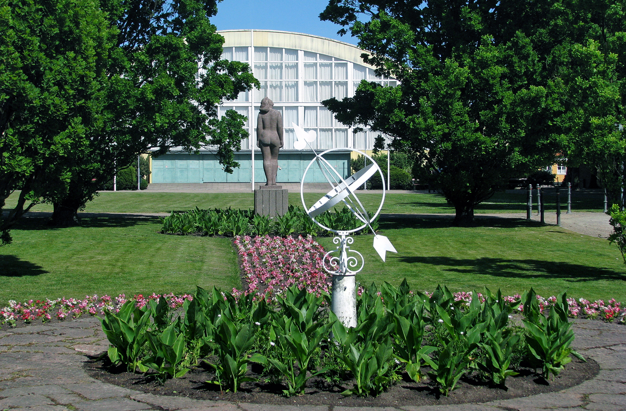 Bollhusparken med Bollhuset i fonden. Bollhuset i folkmun kallad "Bollen" byggdes för utställningen Fritiden i Ystad 1936. Den byggdes med en för dåtiden ny teknik som blev mycket uppmärksammad inom arkitektkretsar. Under utställningen fungerade den som restaurang. Idag är Bollen en idrottshall. I parken finns statyn Sol av Thorwald Alef